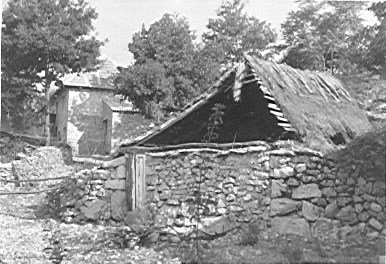 Stara i nova kuca na Podini u Donjem Crncu, BiH.gif